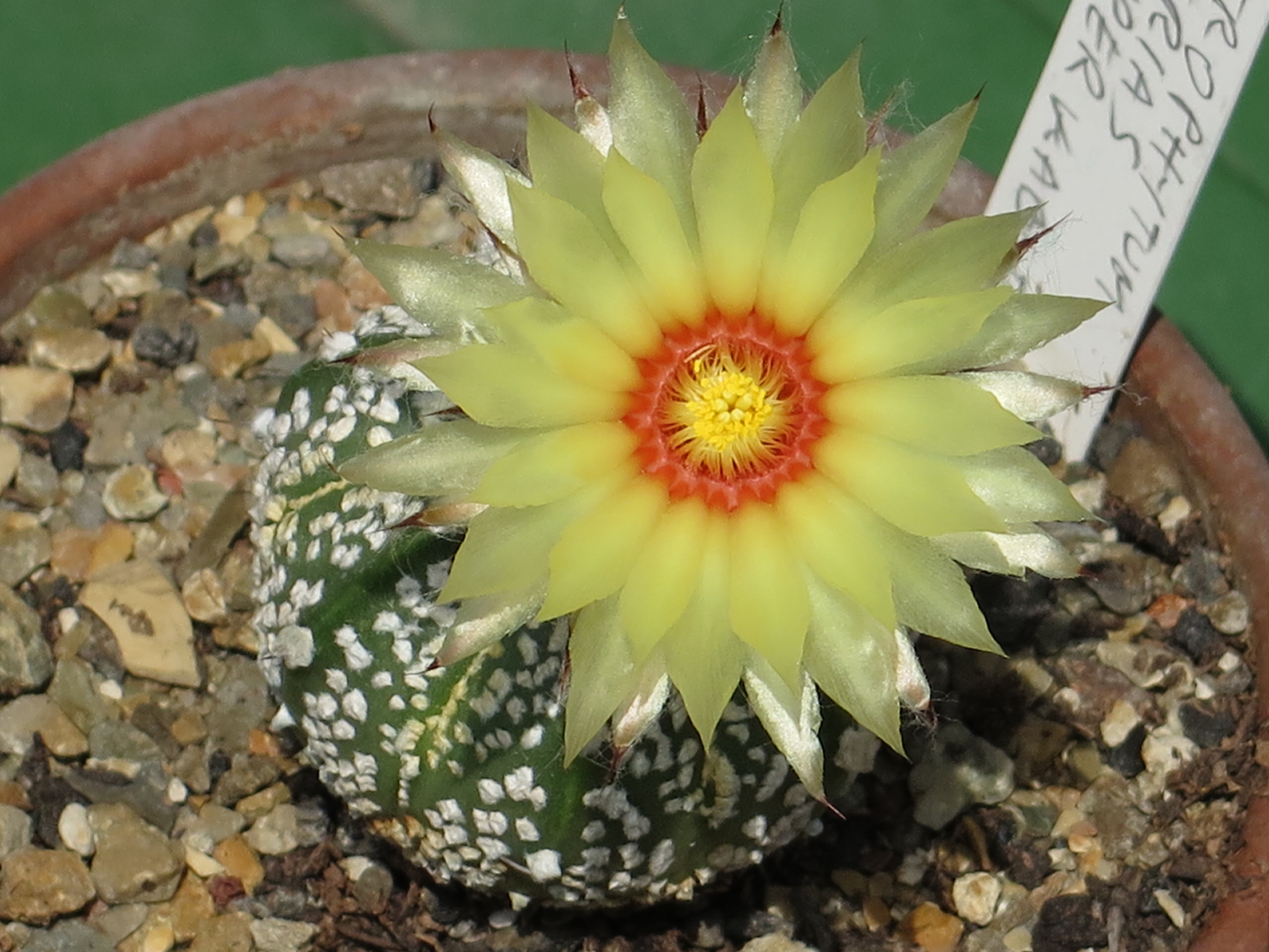 Il fiore dell'astrophytum asterias cv. superkabuto